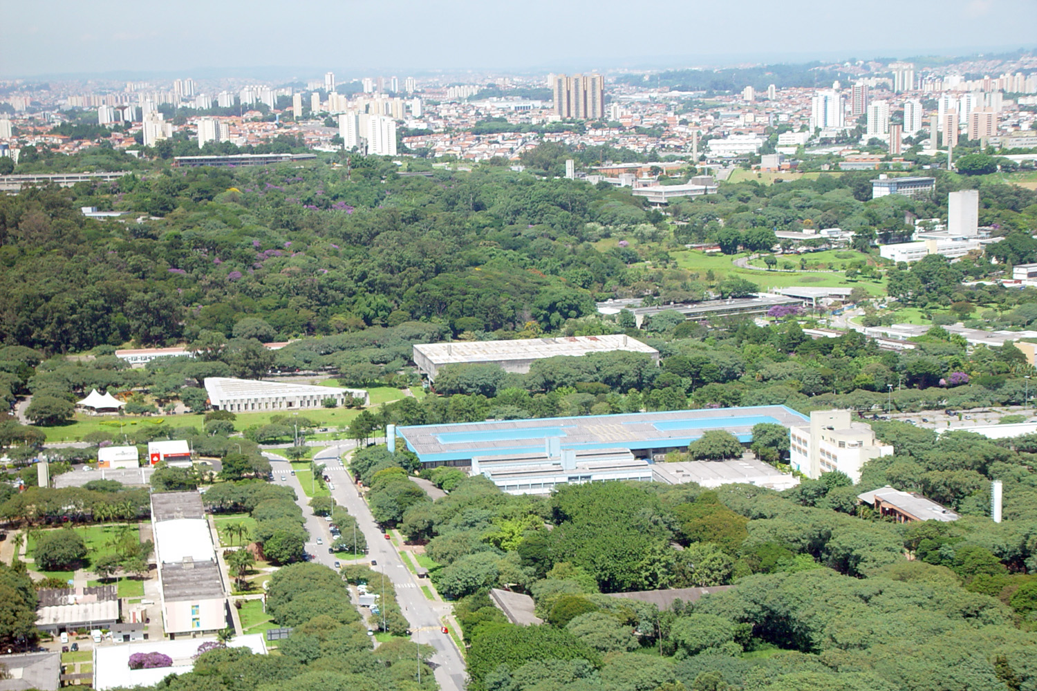 USP, Universidade de São Paulo, Faculdade de Arquitetura e Urbanismo